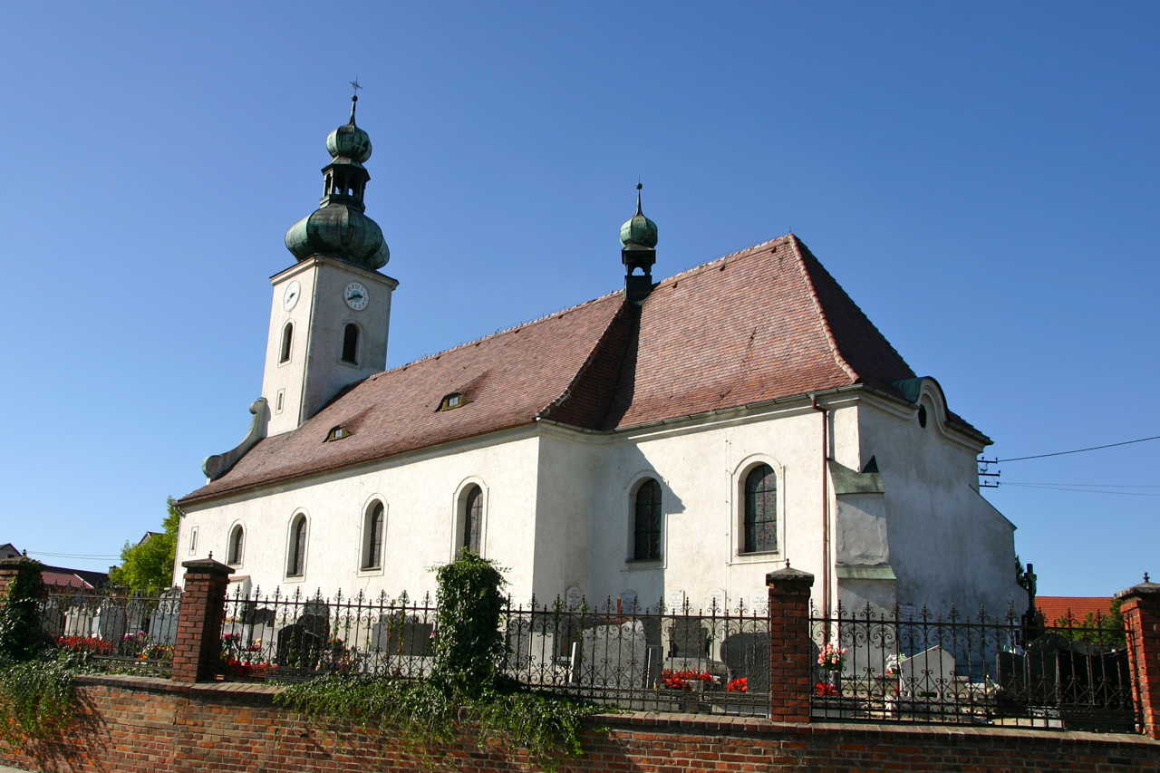 Biedrzychowice – wieś w Polsce położona w województwie opolskim, w powiecie prudnickim, w gminie Głogówek.